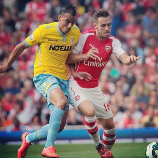 Шамах у грі проти "Арсенела". 1 тур АПЛ. Сезон 2014/2015